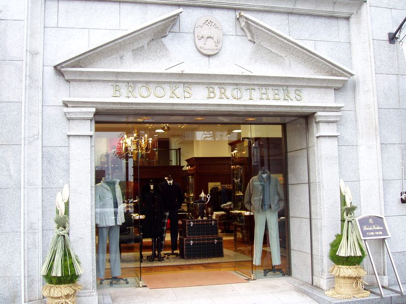 ブルックズ・ブラザース